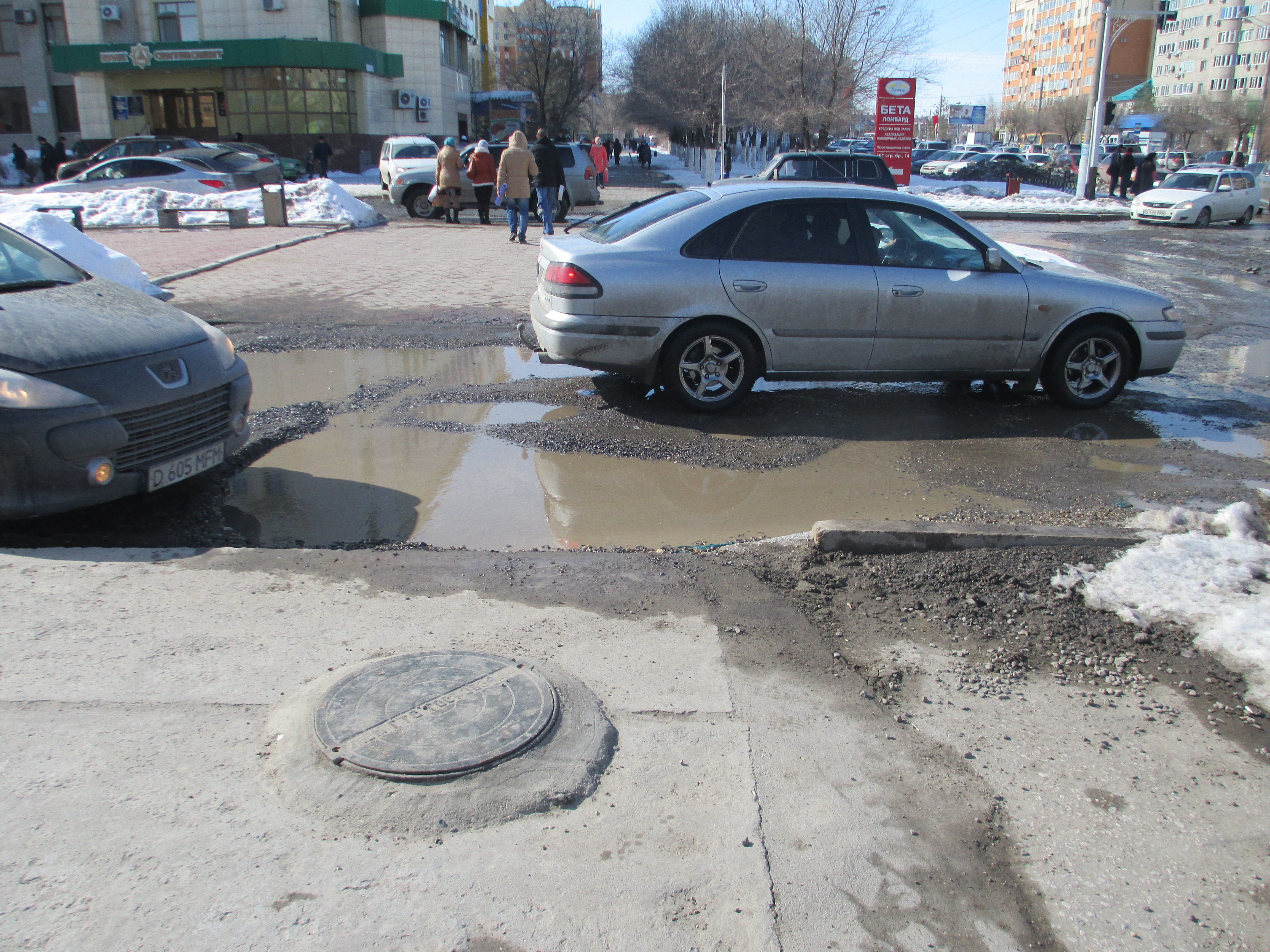 Пересечение ул. 101 стрелковой бригады и пр. Абулхаир-хана в Актобе.